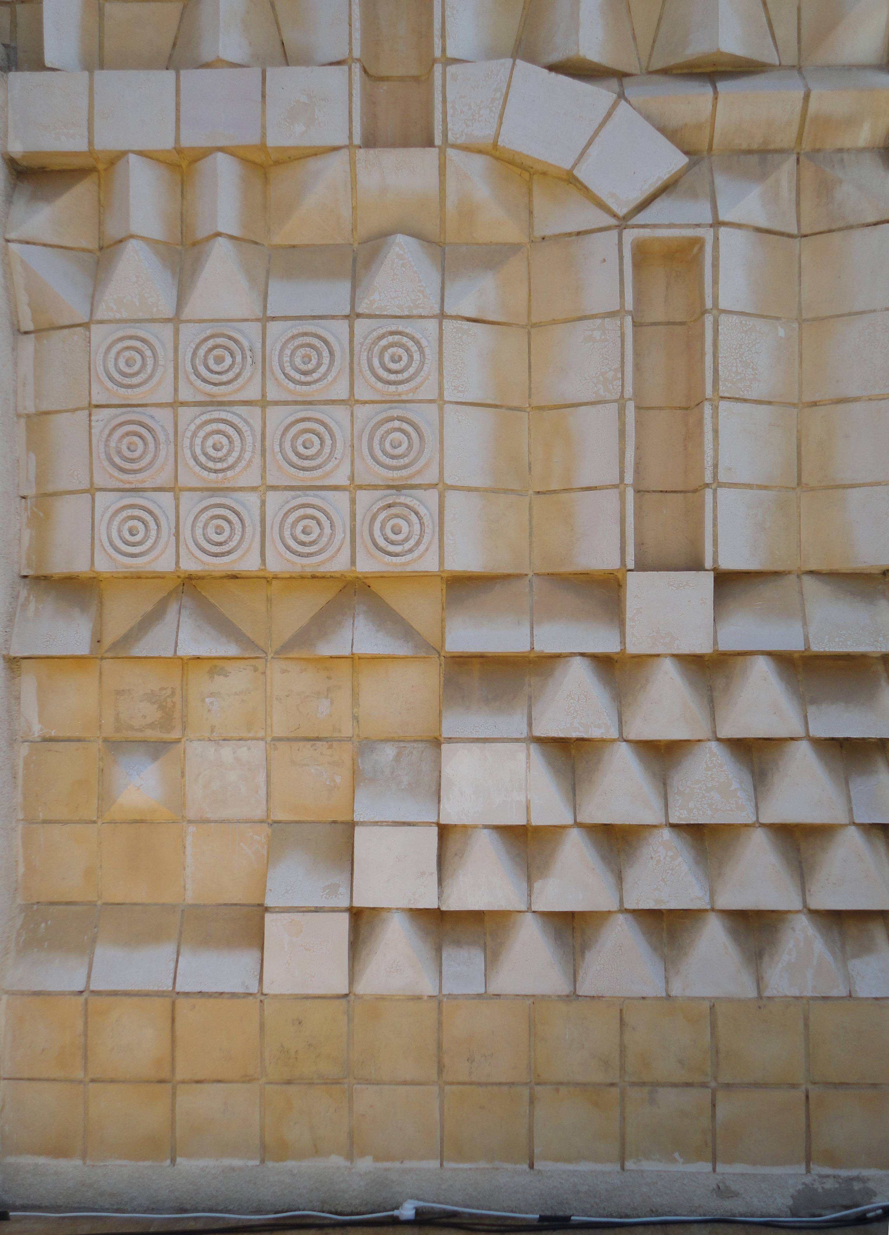 Ceramic Relife